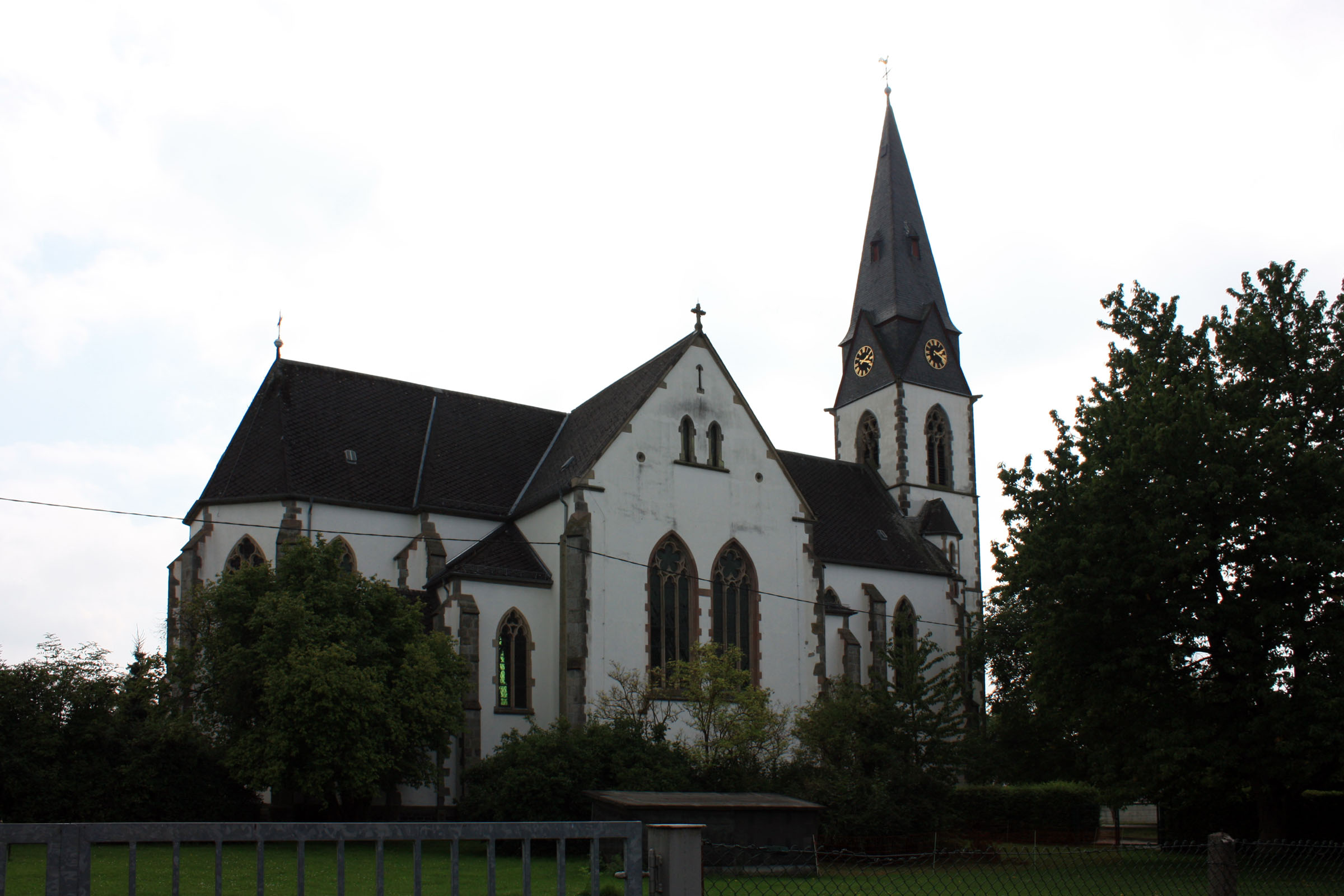 Pfarrkirche St. Nikolaus in Dorchheim, Hessen (erbaut 1905/06)